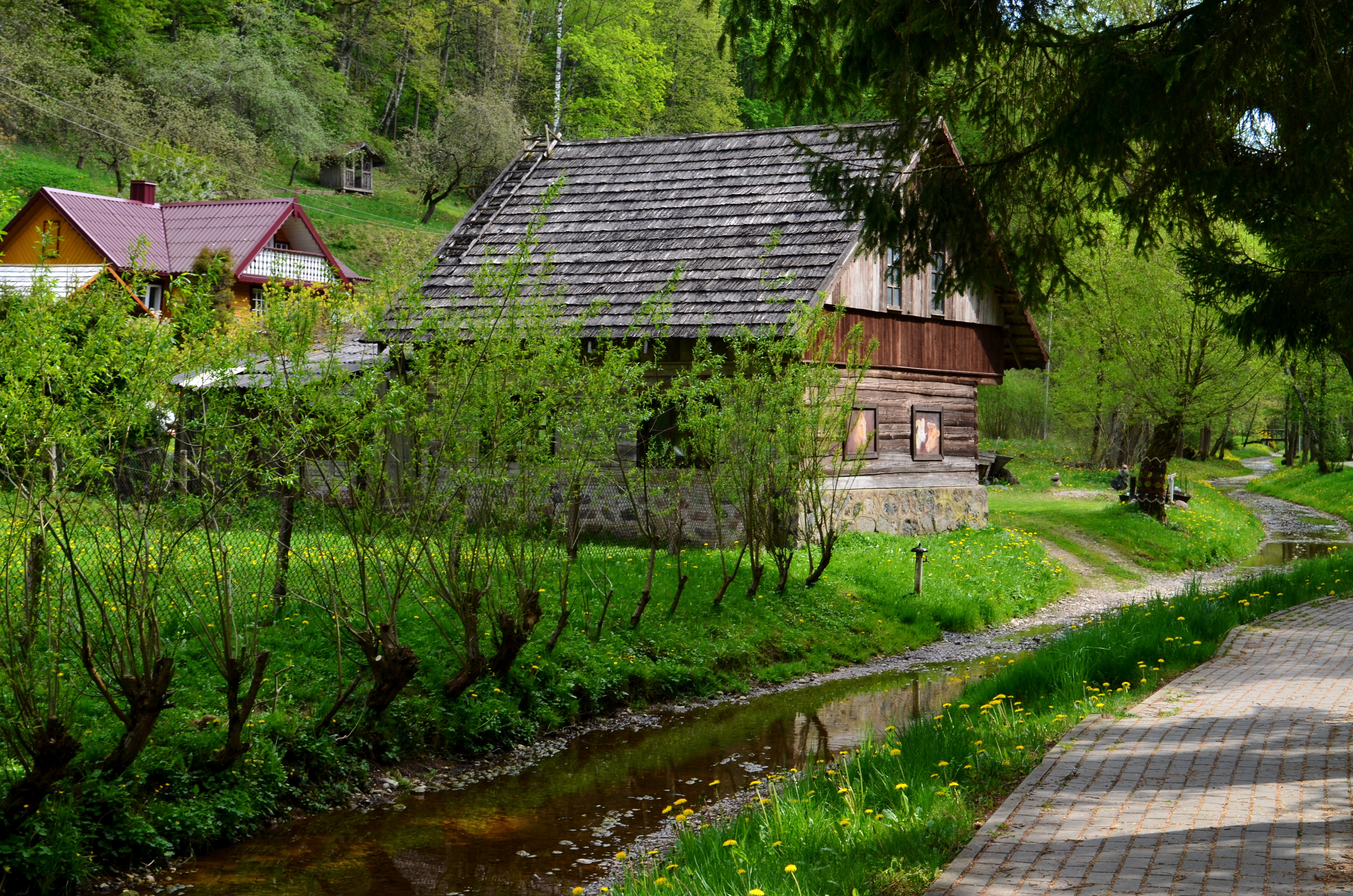 Vaiguvos upelis Plokščiuose, Šakių raj.